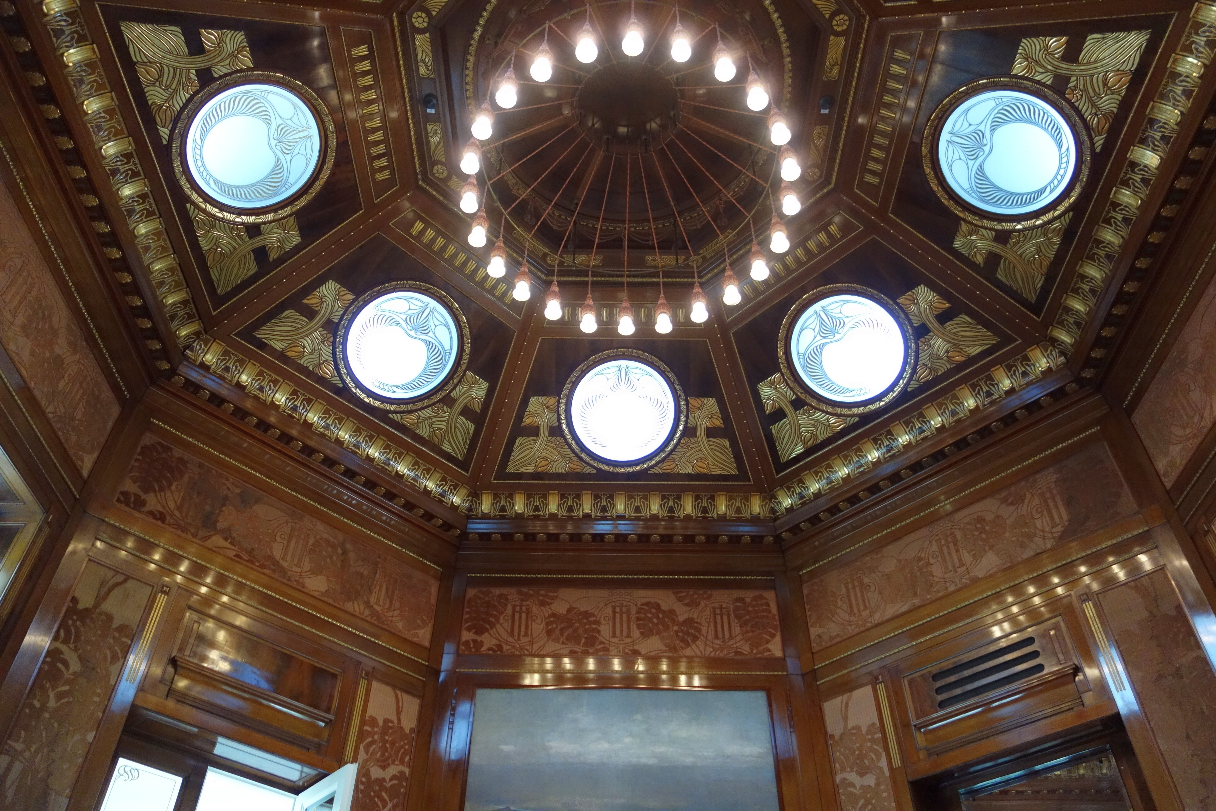 Ehem. Hofpavillon Schönbrunn, Kaiserpavillon